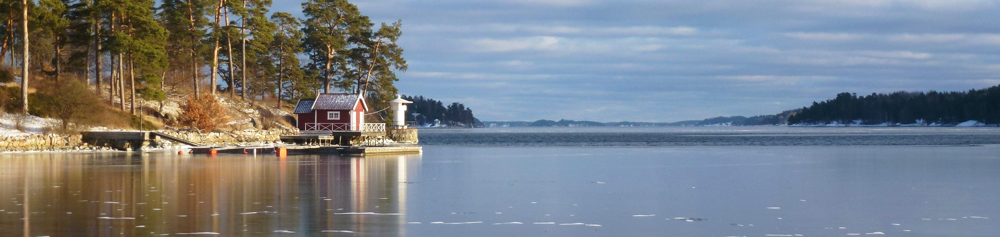 Stora Värtan mot norr från Aluddens fyr